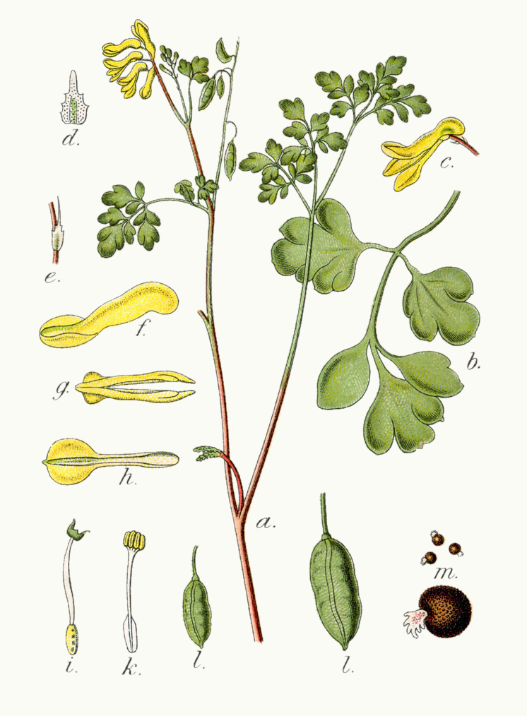 Pseudofumaria lutea (L.) Borkh., syn. Corydalis lutea (L.) DC., Fumaria lutea L. Original Caption Gelber Erdrauch, Fumaria lutea